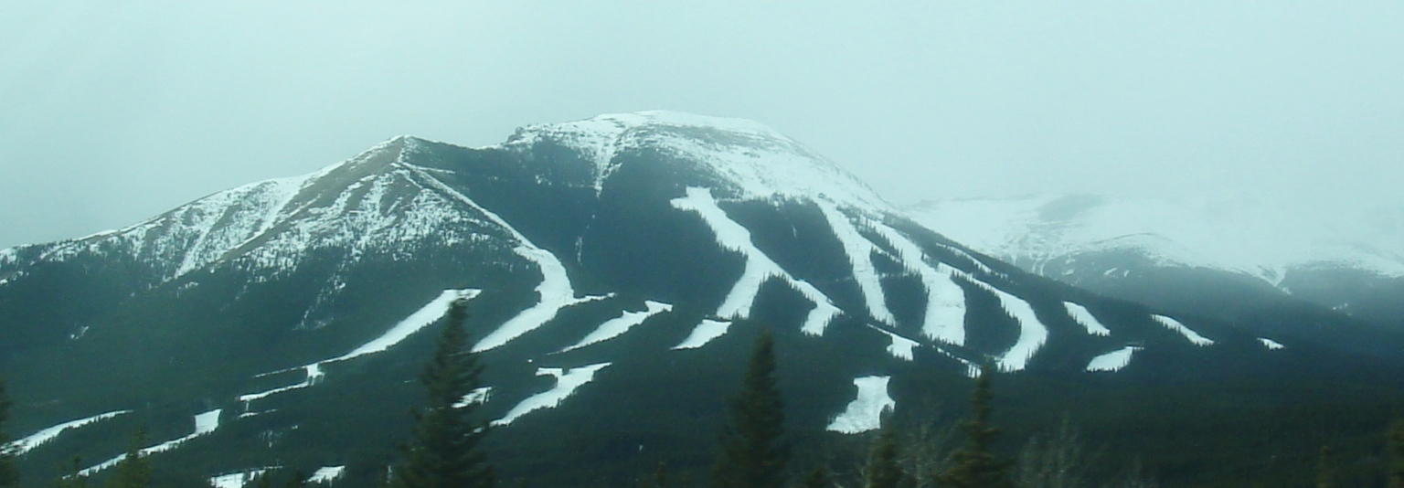 Nakiska ski slopes on Mount Allan, in Kananaskis Country, Alberta, Canada